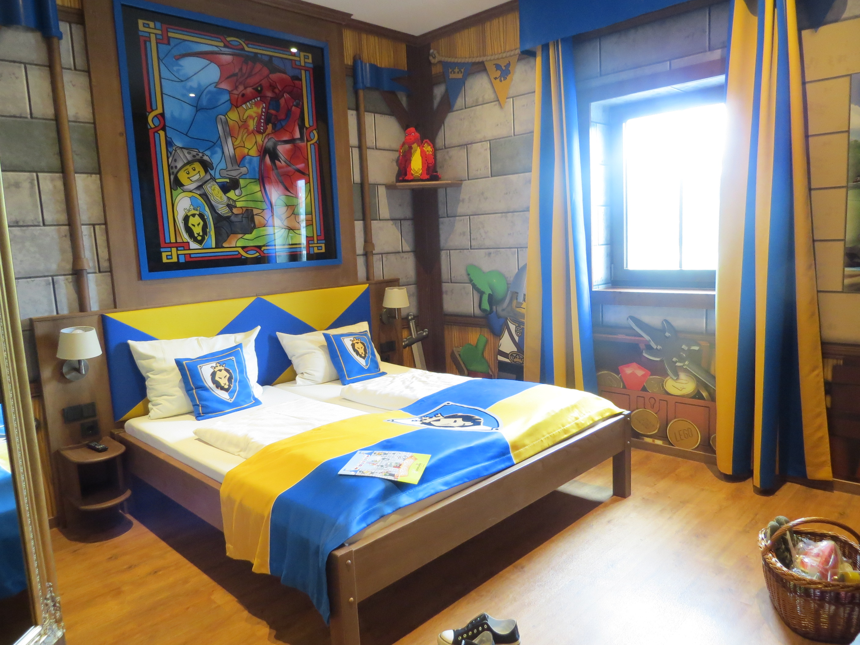 Legoland Deutschland Günzburg